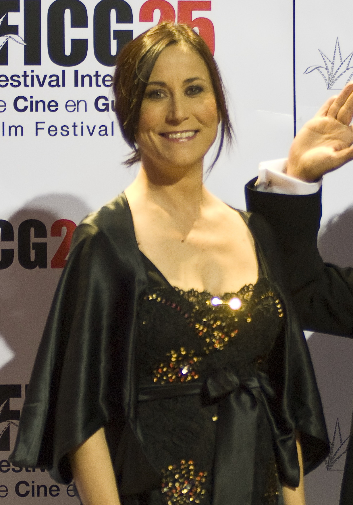 12.03.10 Lumi Cavazos posando en el Foto wall de la Alfombra Roja de la Gala de Inauguración, en el marco de actividades del Festival Internacional de Cine de Guadalajara en su edición 25 . 12 de Marzo, 2010. Guadalajara, México. © Cortesía FICG25 / Gonzalo García Ramírez.